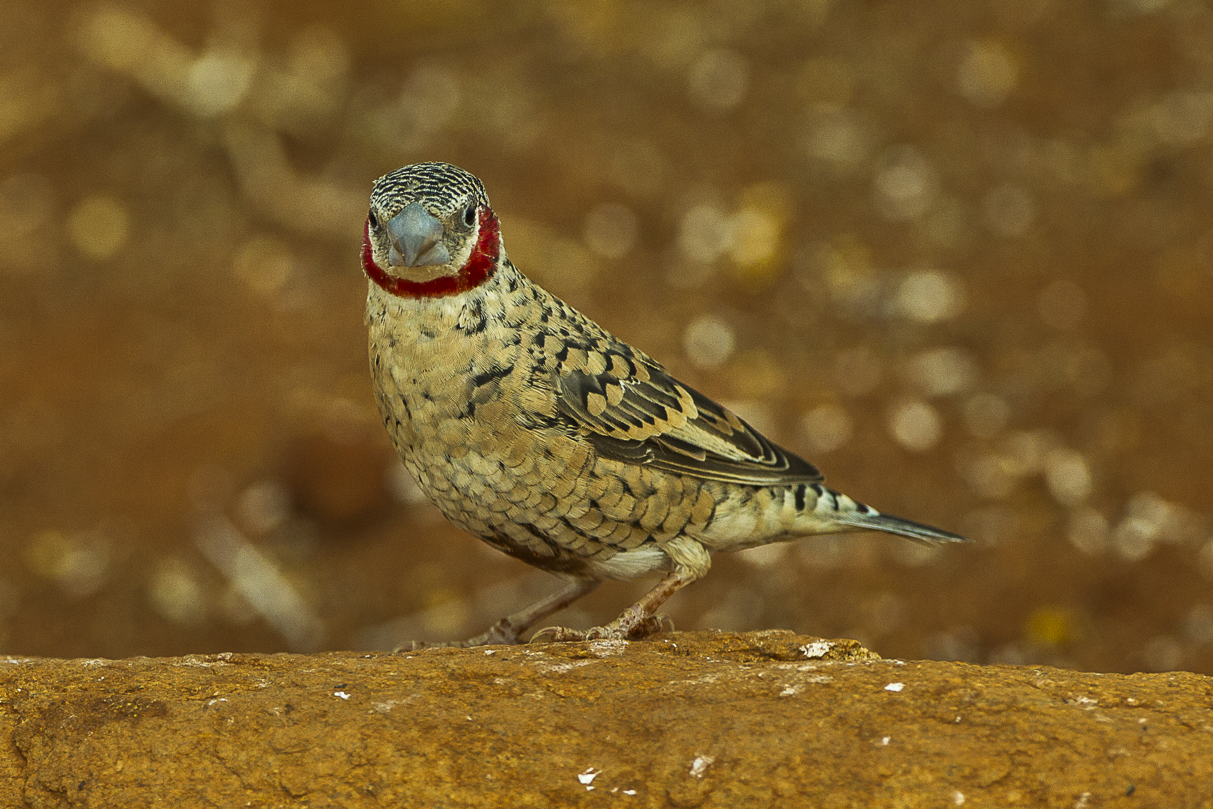 Cut-throat - Samburu - Kenya_S4E5390